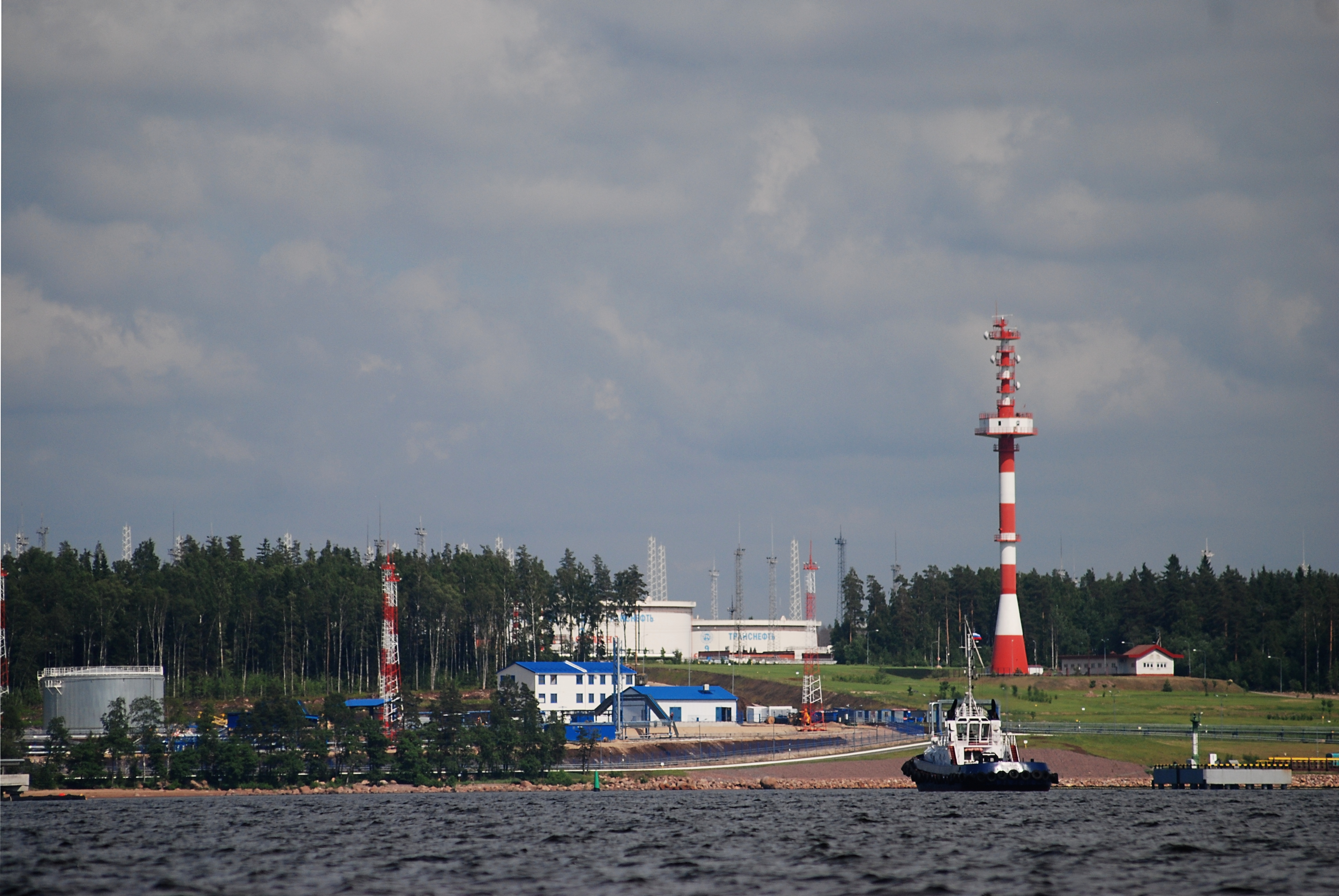 Bulk-oil port